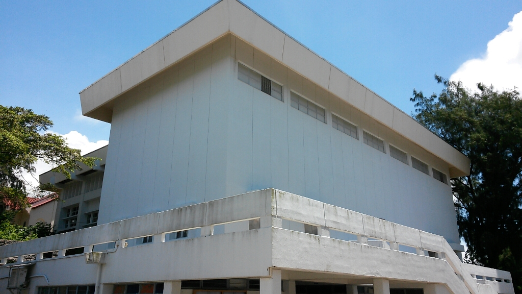 Ng Wah Hall, St. Stephen's College